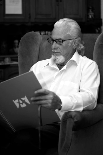 Retrato realizado en el estudio del pintor granadino Fernando González García.